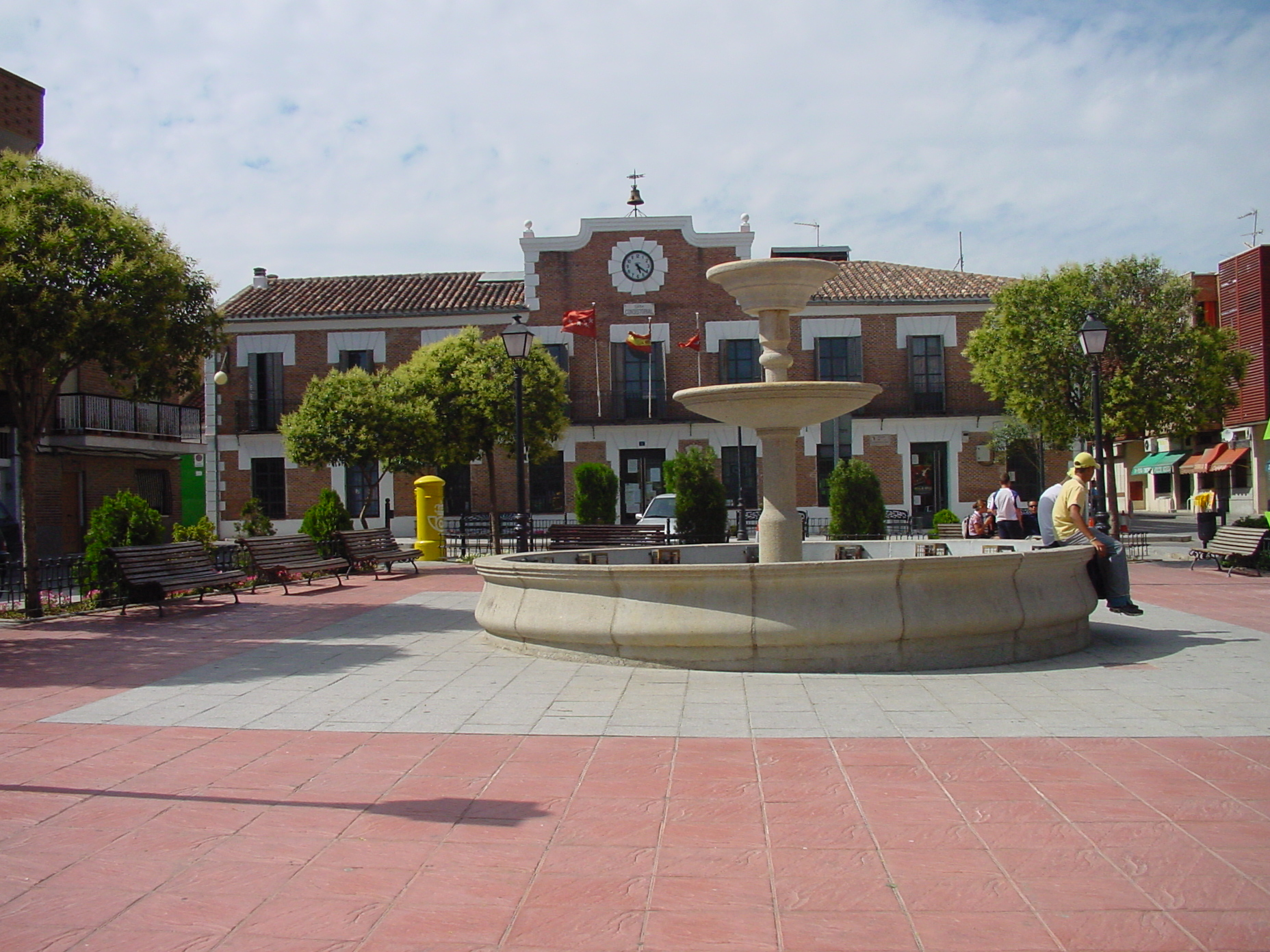 Plaza con fuente y Ayuntamiento en Paracuellos de Jarama.